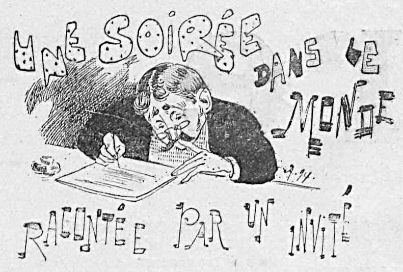 Page 2 & 3 of Le Rire, cartoons and text by Jack Abeillé (issue 8, December 29, 1894)